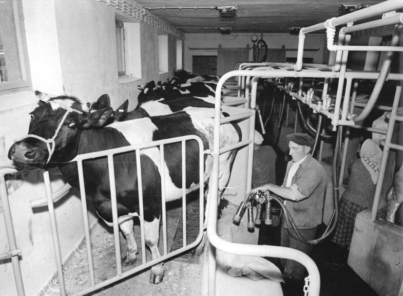 Neu-Kosenow, Bauern im Melkstand Zentralbild Weiß 1.6.1959 LPG Neu-Kosenow erhielt Fischgrätenmelkstand. Die LPG Neu-Kosenow im Kreis Anklam konnte vor einigen Tagen den für die vorhandenen zwei Rinderoffenställe mit 120 Plätzen geplanten Fischgrätenmelkstand einweihen. Aus Anlaß des bevorstehenden 10. Jahrestages der DDR wurde die Verpflichtung übernommen, die Milchleistung pro Kuh von 2 600 Kilo auf 2 700 Kilo erhöhen. UBz: Die letzten Vorbereitungen zum Melken werden getroffen.